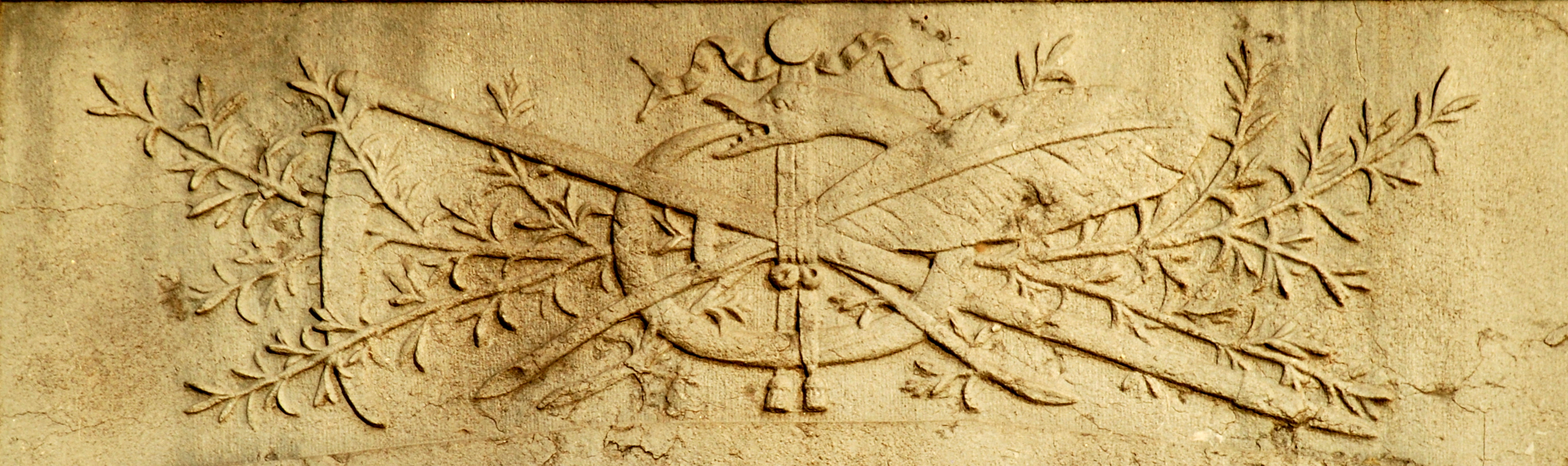 Belgique - Brabant wallon - Ottignies - Église Saint-Rémi - Ouroboros